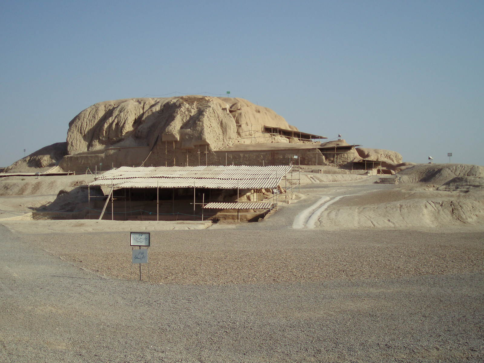 Iran 2007 254 Tappen ye seyaik ziggurat